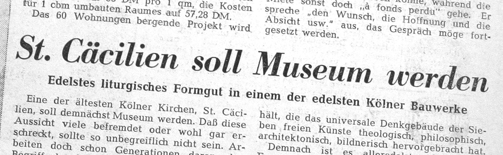 Zeitungsausschnitt von 1951 nach Entscheidung, die Cäcilienkirche als Raum für das Schnütgen-Museum zu nutzen. Mit dem Artikel gelangt der Plan an die Öffentlichkeit